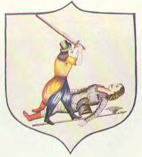 Беларуская (тарашкевіца): Герб Невеля (Nieviel)